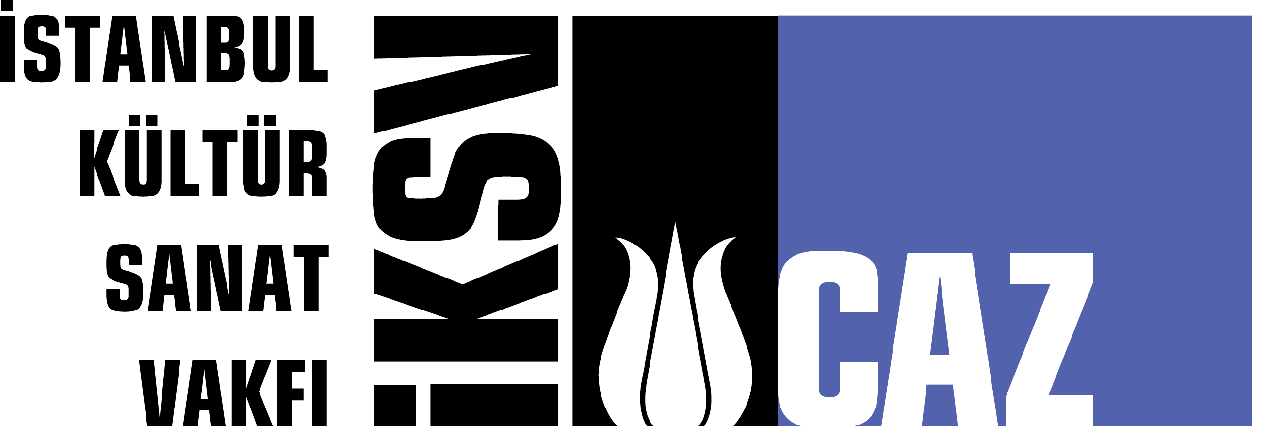 İstanbul Caz Festivali logosu